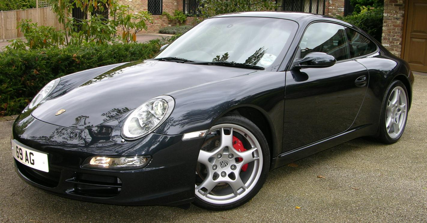 Porsche 911 Carrera 2S